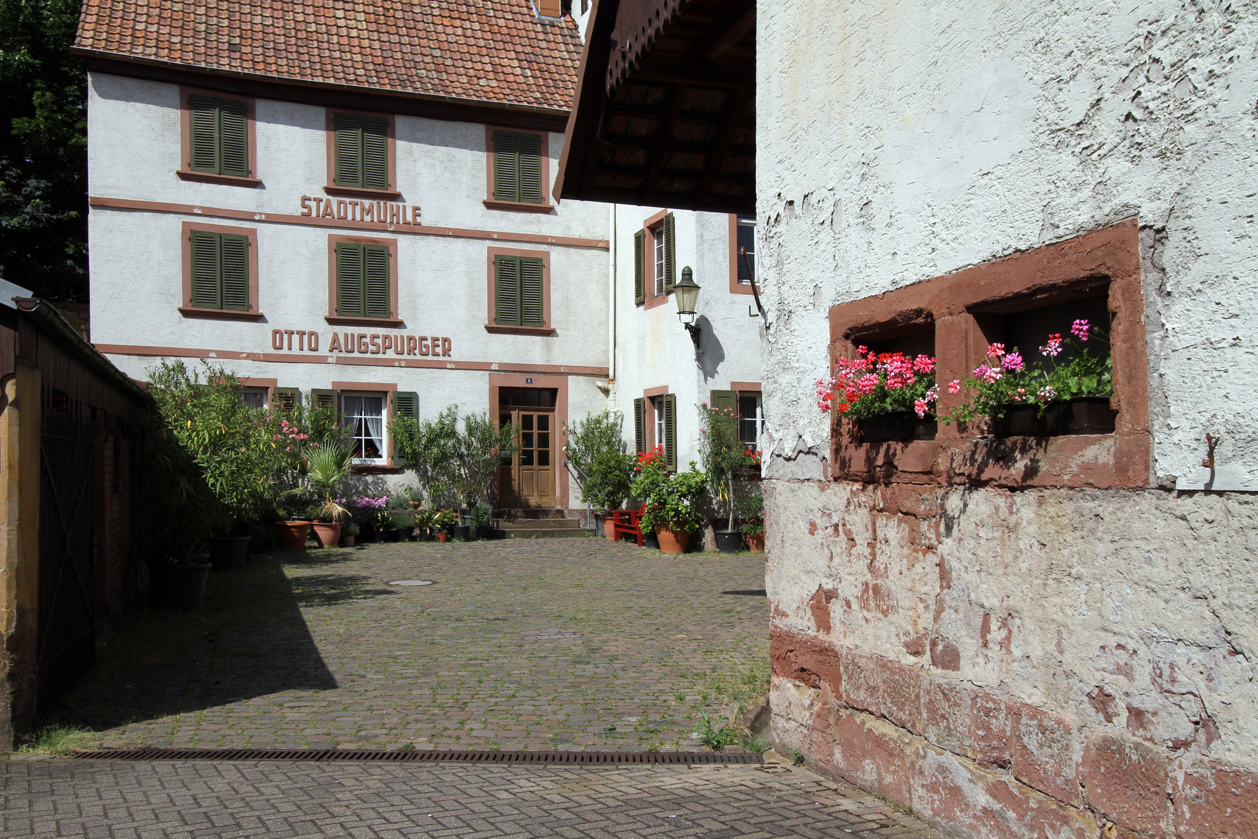 Bad Bergzabern